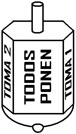 Perinola (dibujo de una perinola) trompo, peonza Hecho por Tute